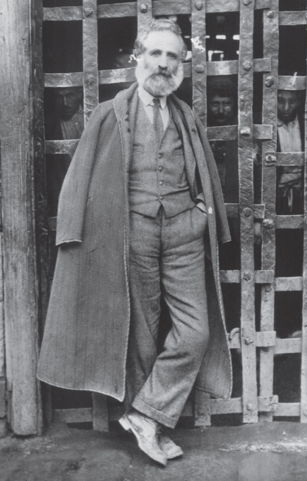 Nazım Resmor (Öztelli) Türkiye halk İştirakiyyun Fırkası Baş-Katibi Tokat Milletvekili